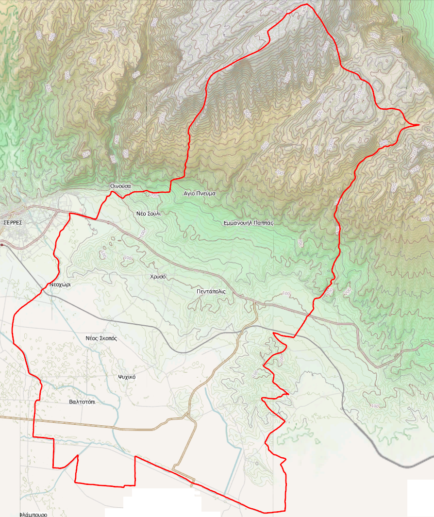 Τοπογραφικός χάρτης του Δήμου Εμμανουήλ Παπά